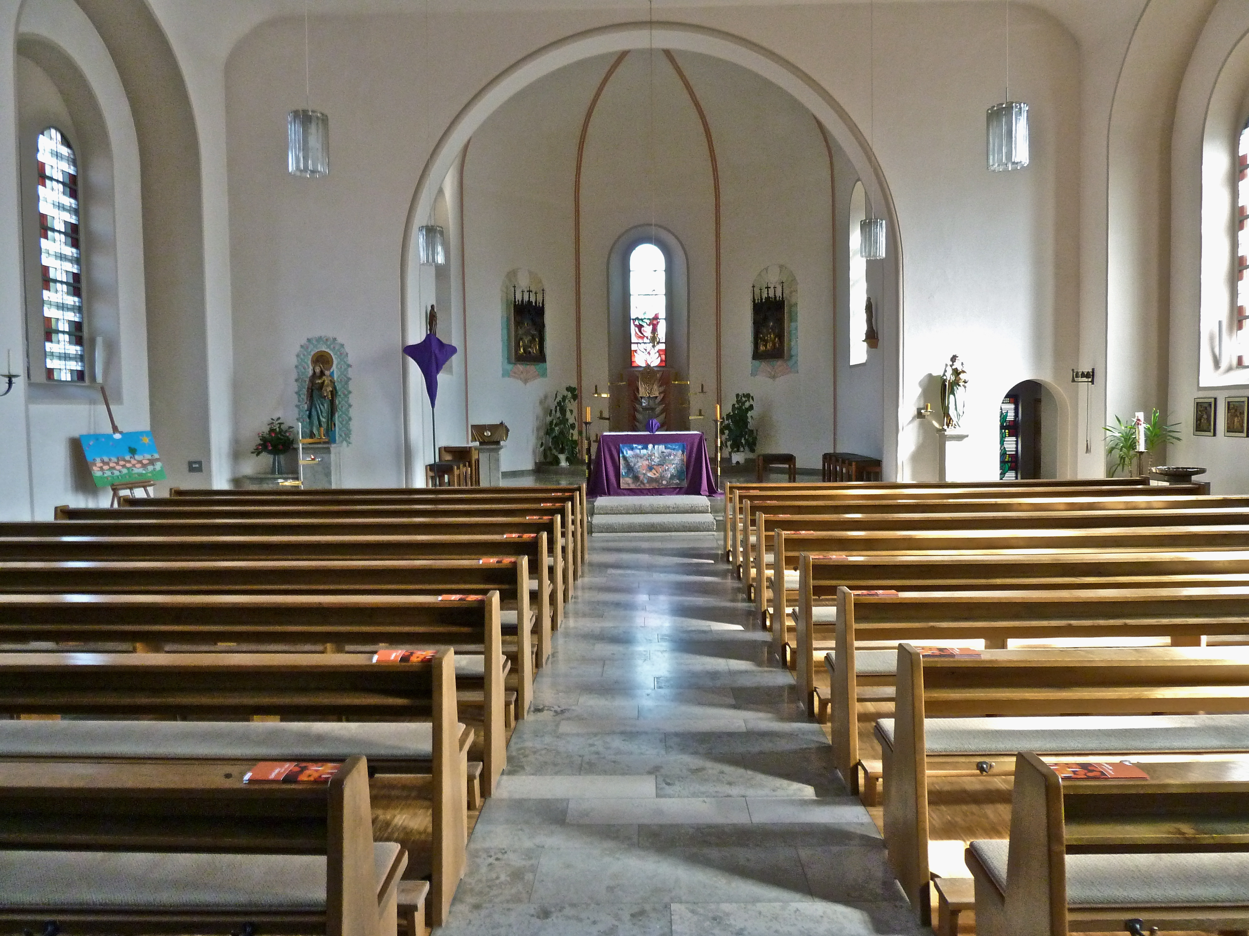 In der kath. Kirche St. Marien (Diekholzen-Söhre)